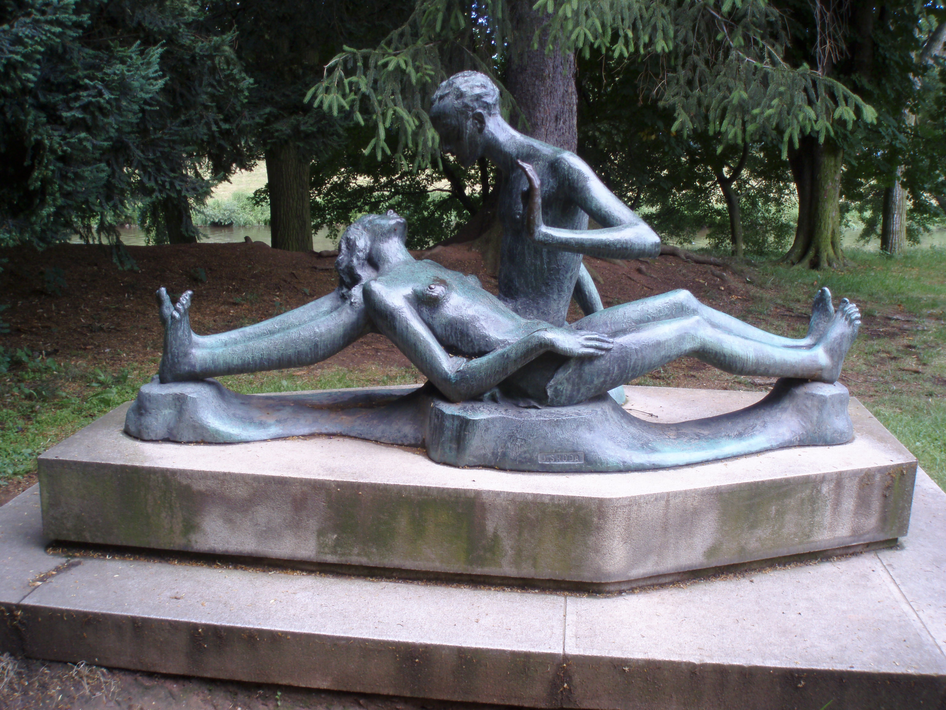 Česky: Sochařské dílo "Soutok Labe a Orlice" v Hradci Králové